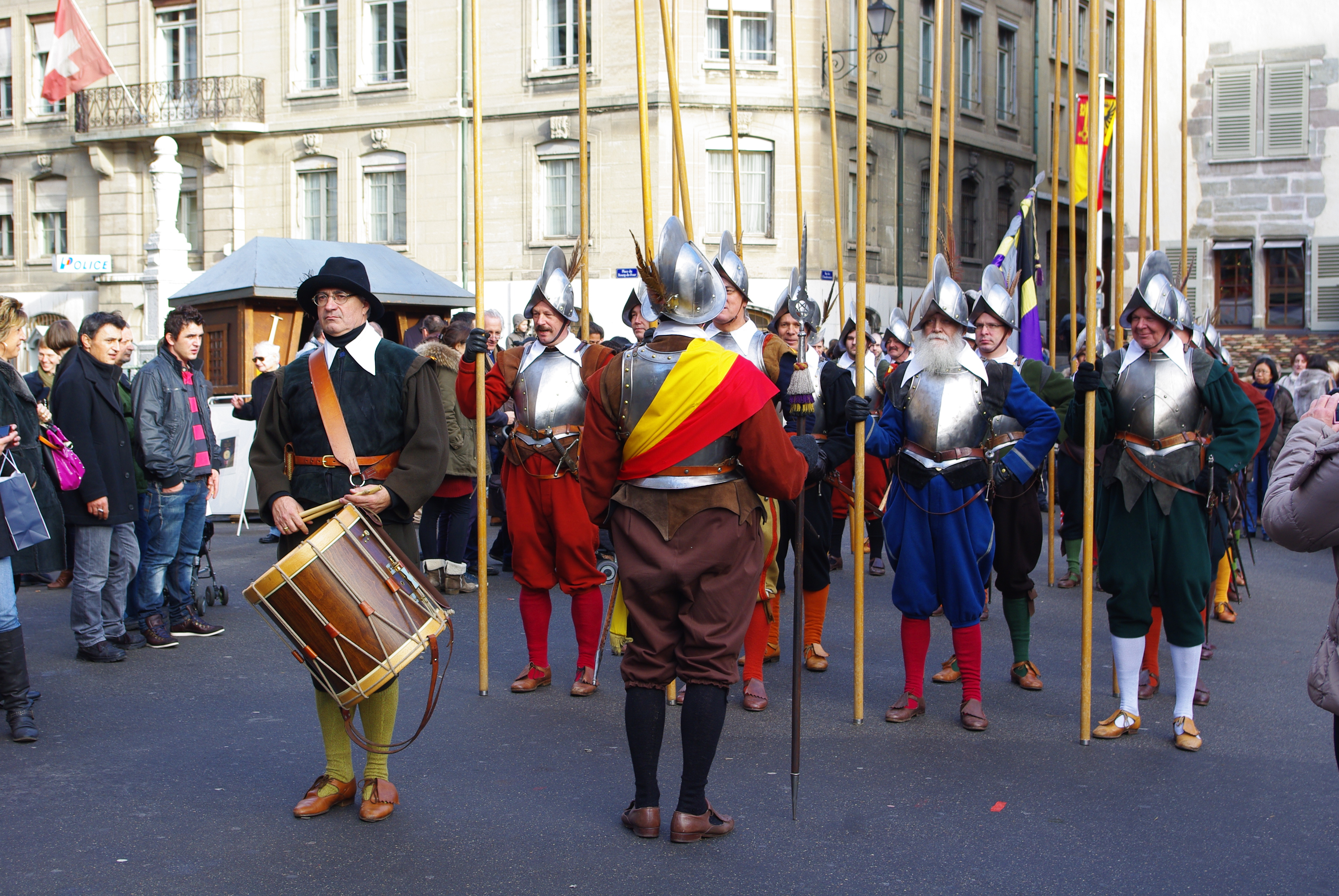 Lanciers de la Compagnie de 1602 lors de l'Escalade 2011